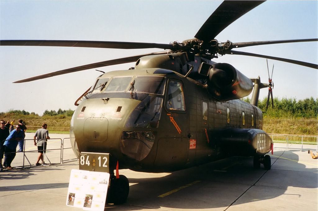 Beschreibung: german CH-53G in Laage (aka Sikorsky S-65)